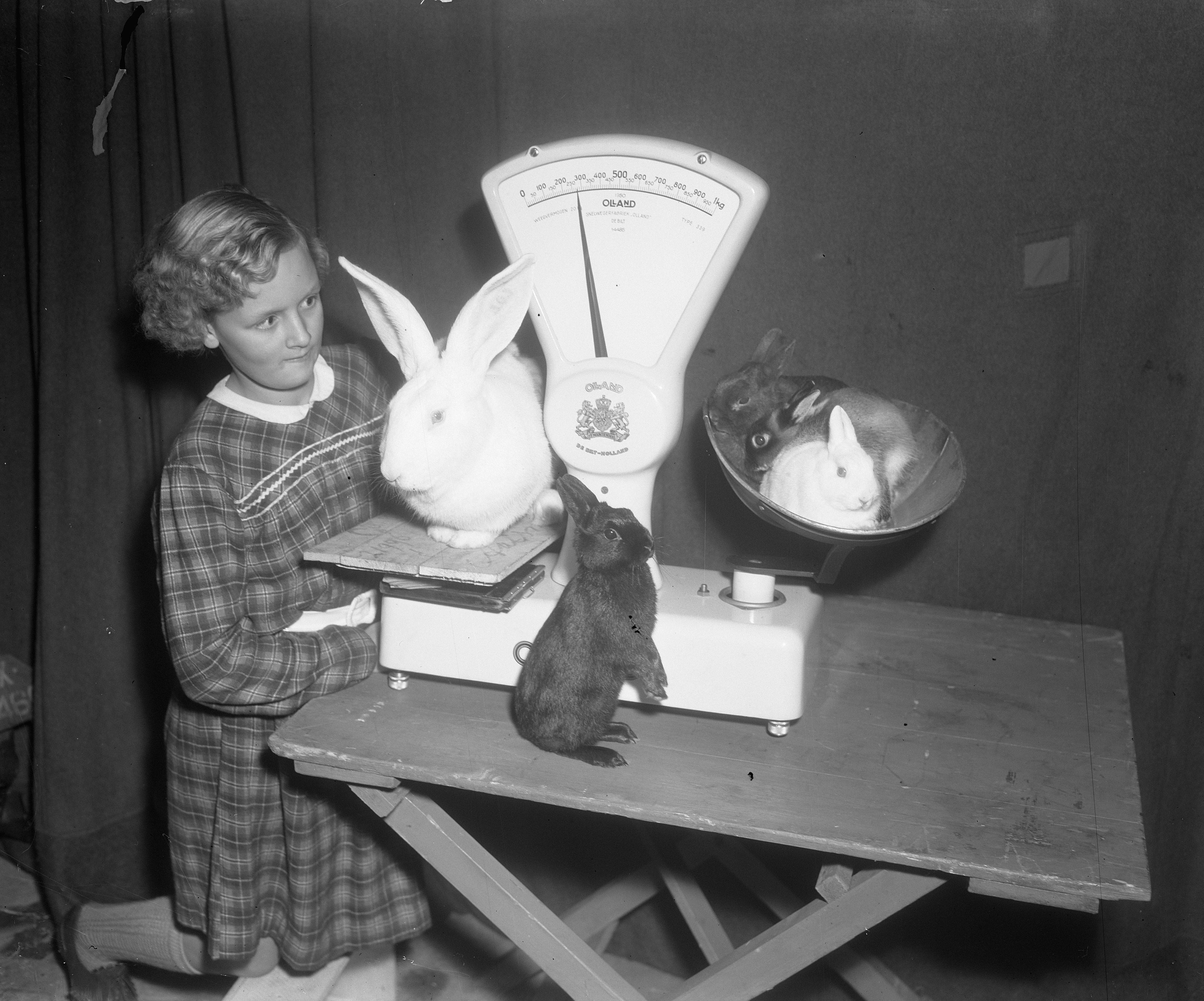 Collectie / Archief : Fotocollectie Anefo Reportage / Serie : [ onbekend ] Beschrijving : Pluimveetentoonstelling Aalsmeer Datum : 10 januari 1952 Locatie : Aalsmeer, Noord-Holland Trefwoorden : pluimveetentoonstellingen Fotograaf : Duinen, […] van / Anefo Auteursrechthebbende : Nationaal Archief Materiaalsoort : Glasnegatief Nummer archiefinventaris : bekijk toegang 2.24.01.09 Bestanddeelnummer : 904-9174